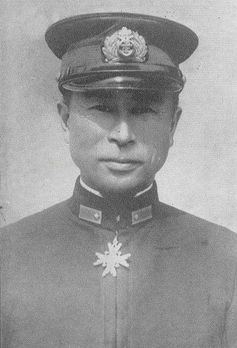 Japanese admiral Arima Masafumi